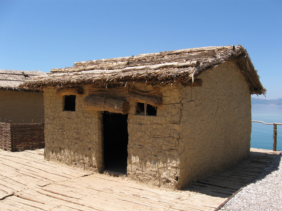 Museum on Water, Ohrid